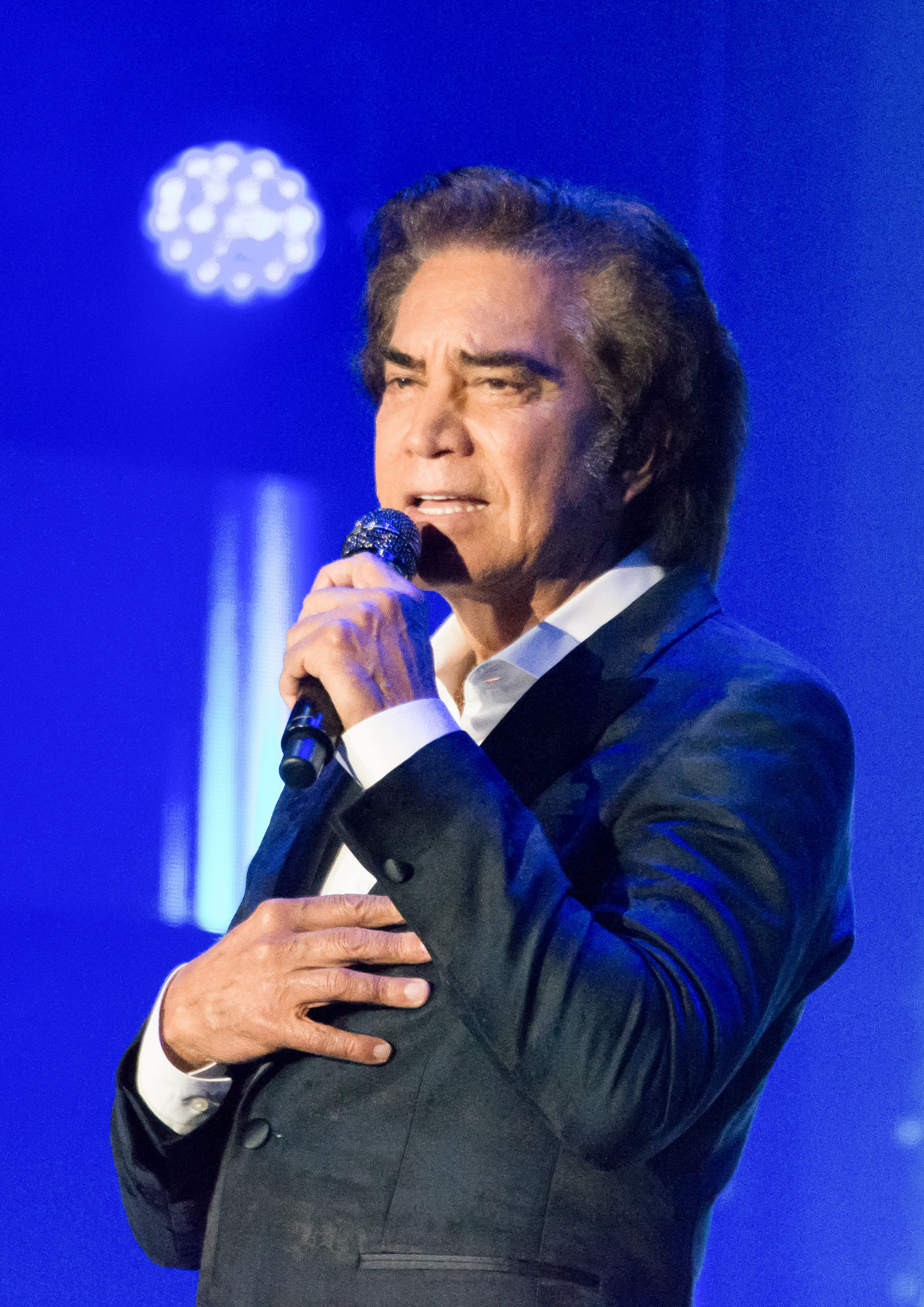 Festival de Las Condes 2020, Parque Padre Hurtado, La Reina, Santiago, Región Metropolitana, Chile